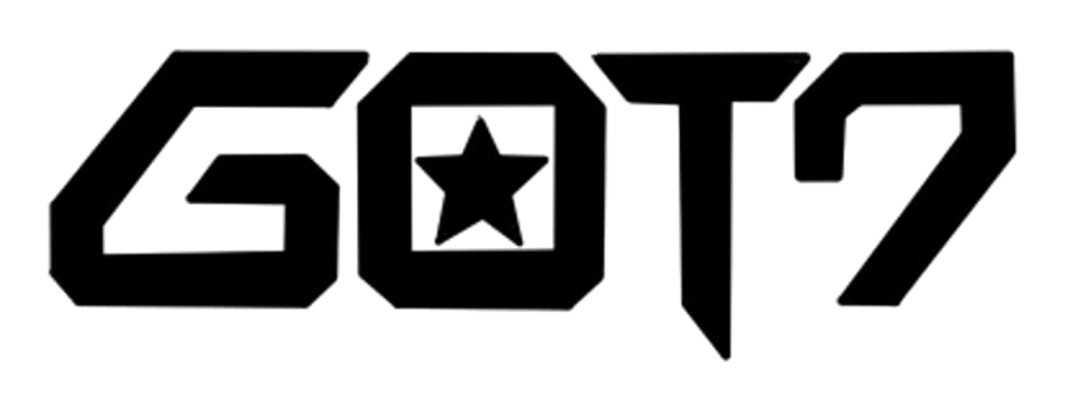 Logo de Got7